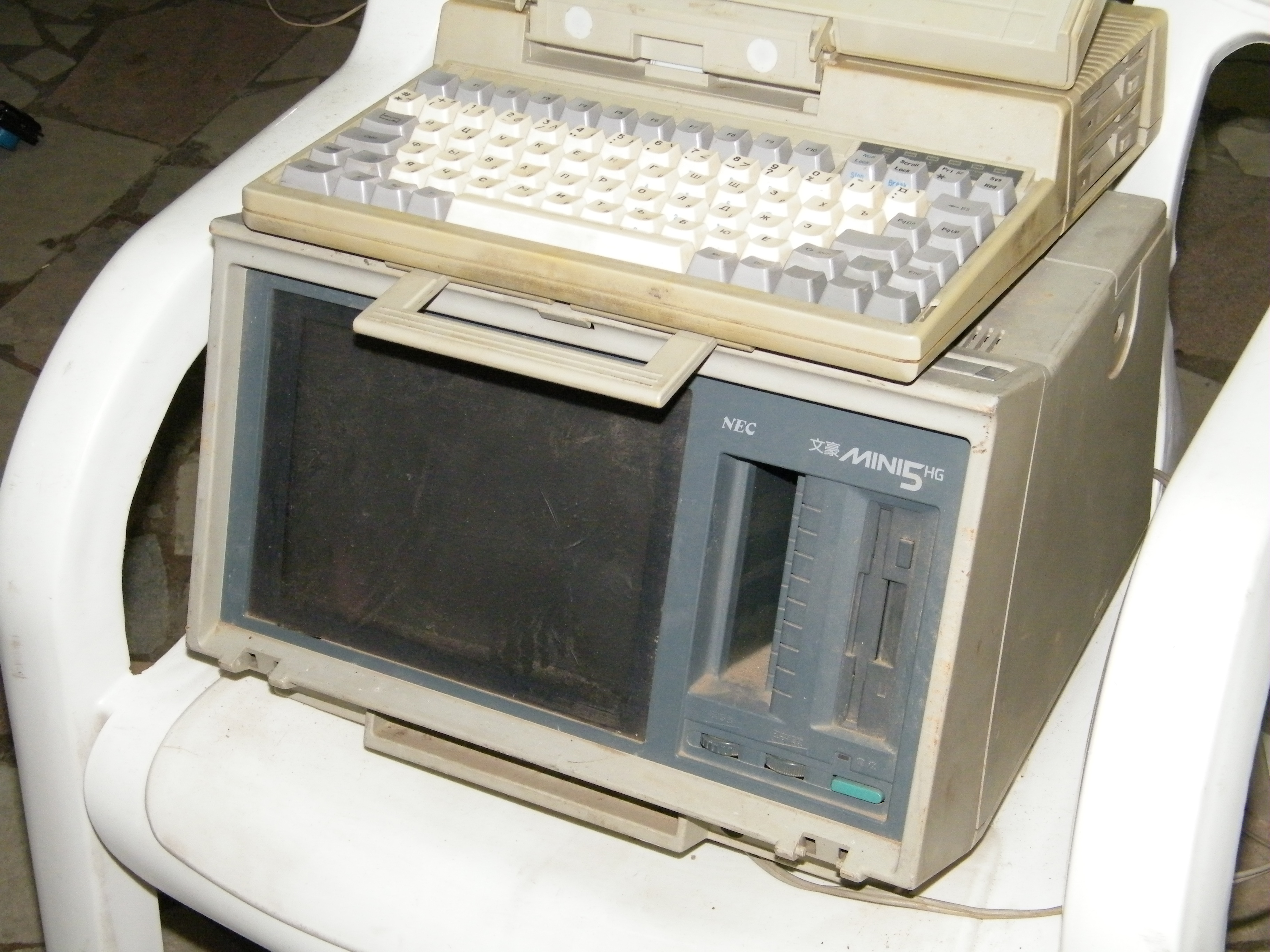 Теплый ламповый звук